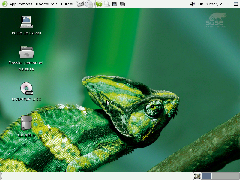 Premier écrans après installation